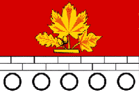 Флаг Красносельского городского поселения, Краснодарский край, Россия.